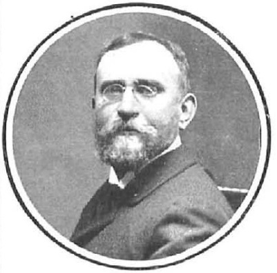 Retrato del marqués de Figueroa por Kaulak y recogido en la revista española Nuevo Mundo.